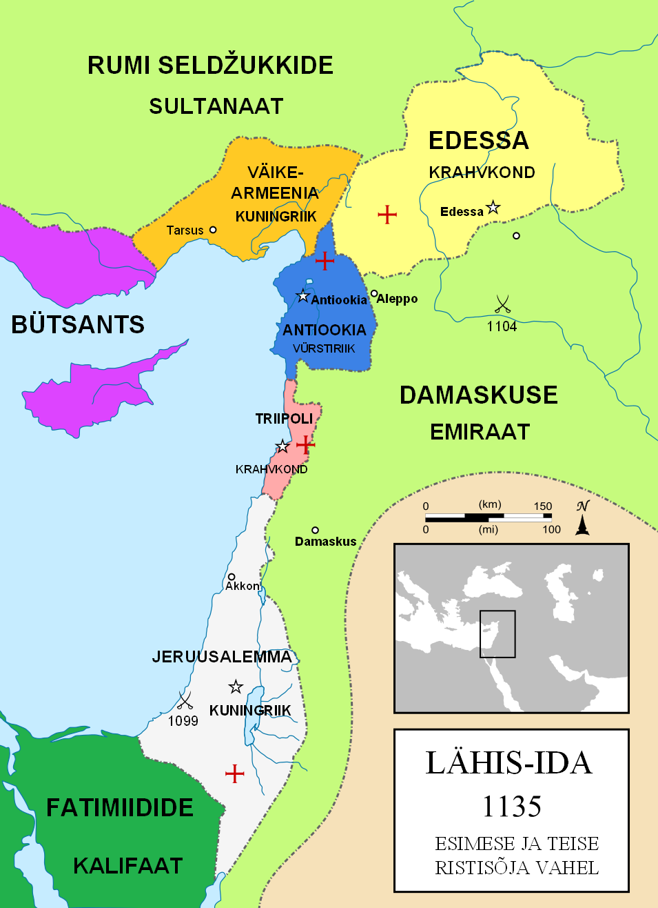 Lähis-Ida (1135)